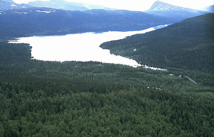 Motiv: Fatmomakke Nyckelord: Flygbilder, Riksintressen Kategori: Fjällbygd Fatmomakke